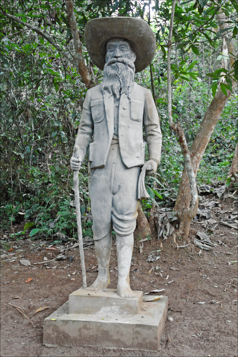 Statue d'Henri Mouhot (1826-1861) érigée à l'endroit de sa mort sur les bords de la Nam Ou au-delà du village de Ban Phanom. Henri Mouhot est le premier européen à s'être rendu à Luang Prabang. Dans ses voyages précédents, il a parcouru le Cambodge et a le premier redécouvert les temples d'Angkor.